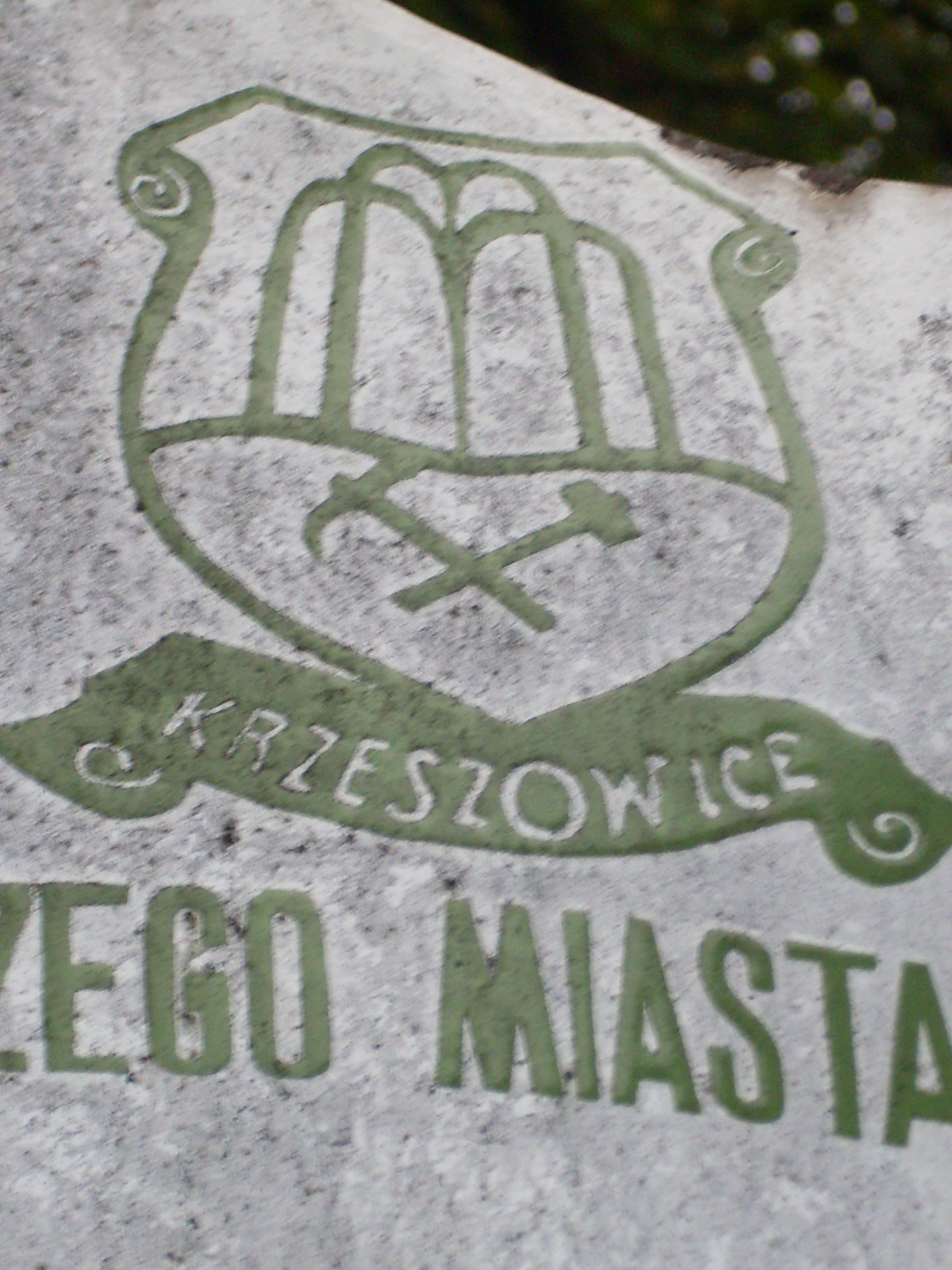 Były herb miasta Krzeszowice, na tablicy w parku